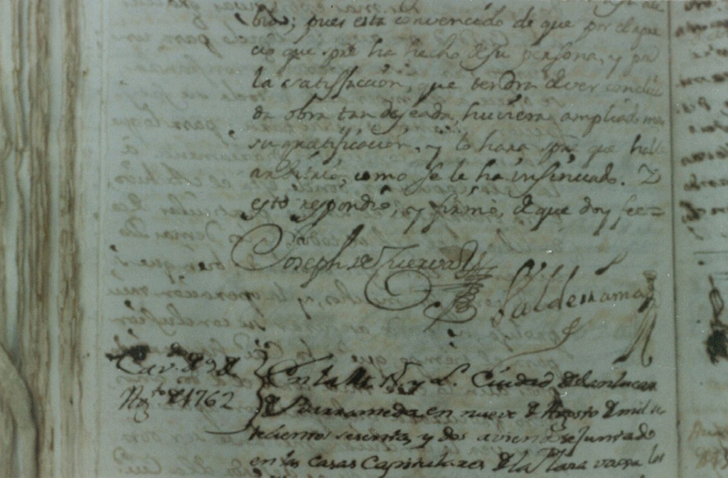 Fragmento de un libro de actas capitulares de Sanlúcar de Barrameda. Siglo XVIII. Archivo Municipal.